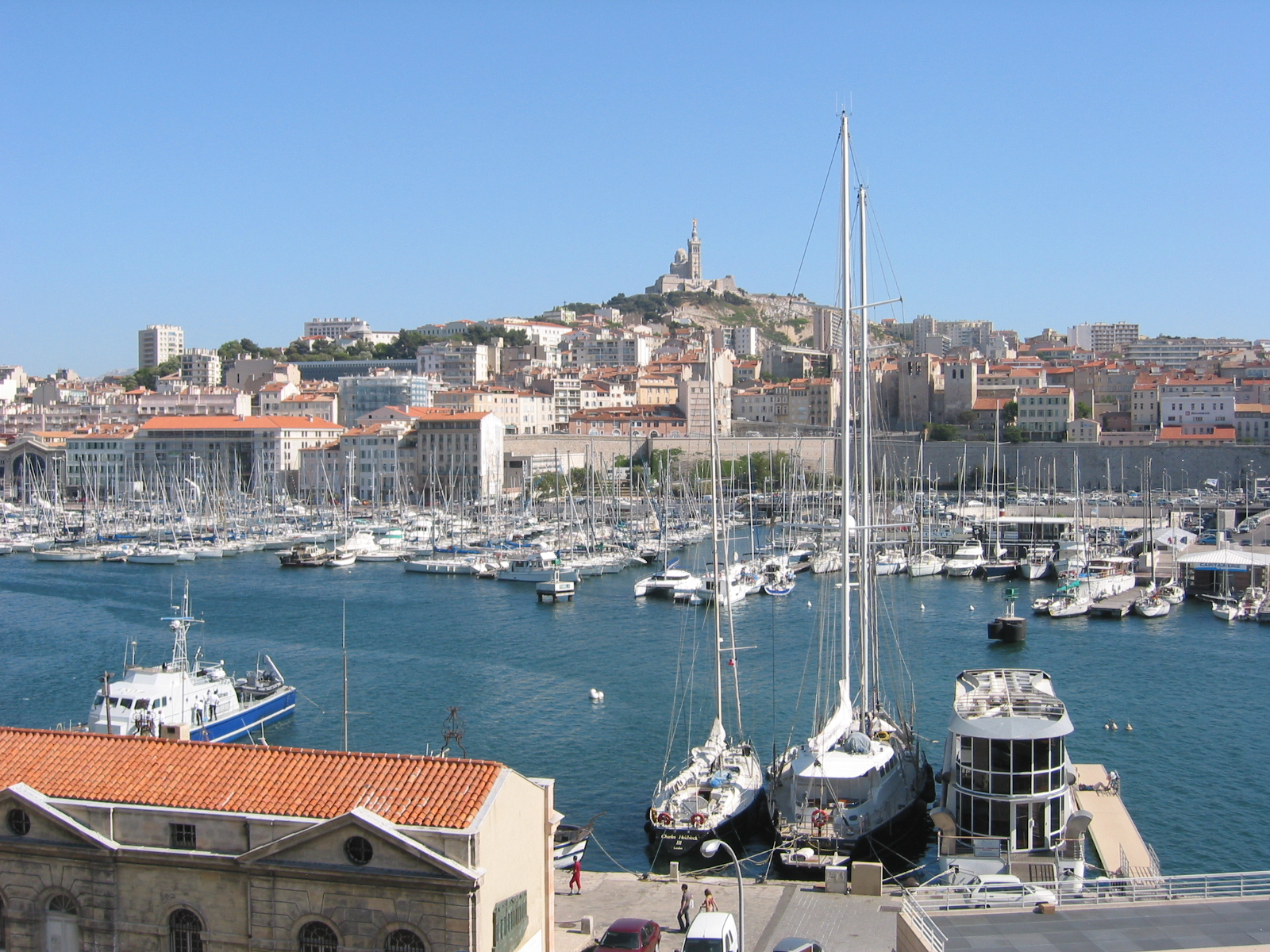 Le Vieux-Port de Marseille, avec au loin, la Basilique Notre-Dame-de-la-Garde.